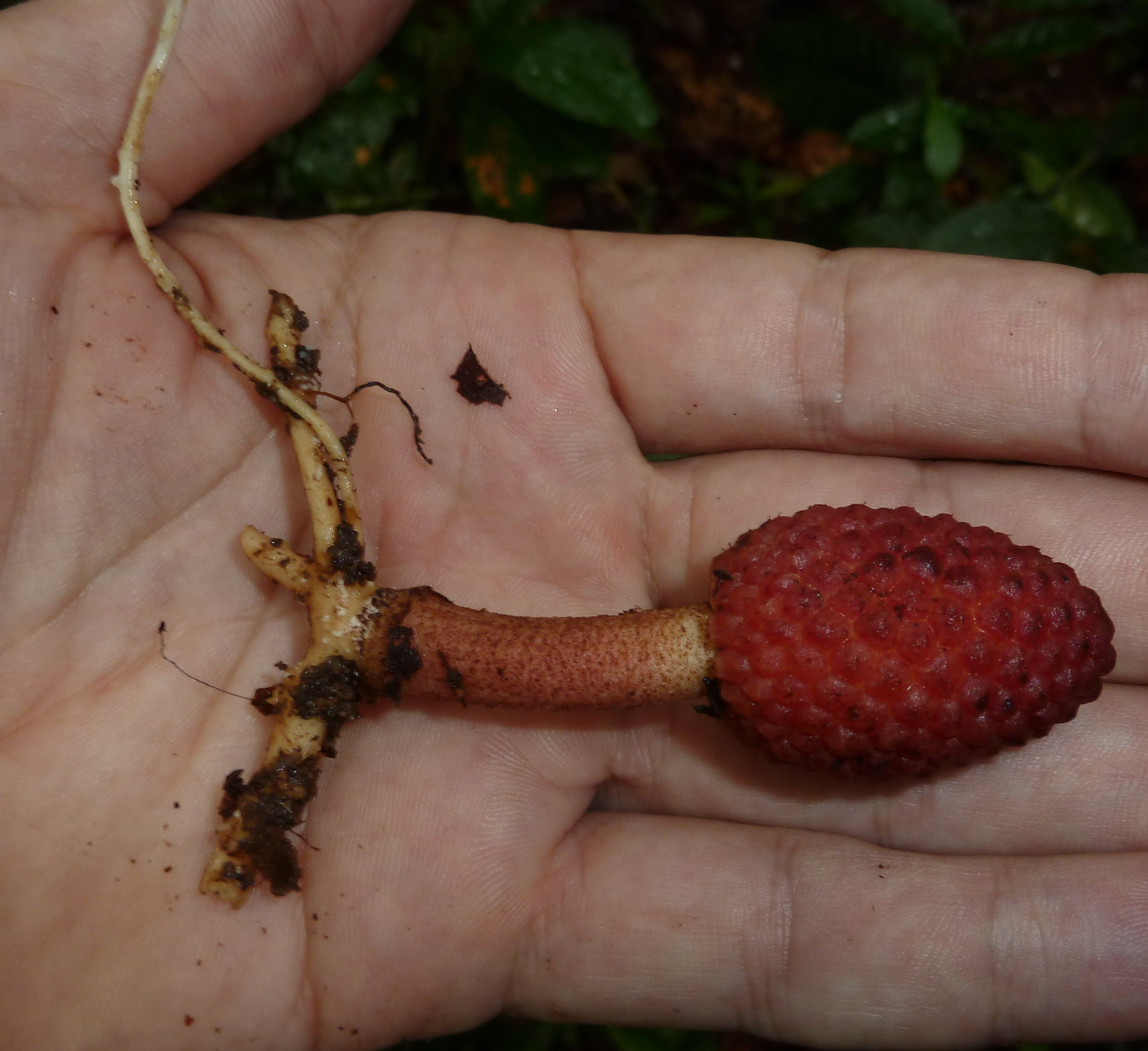 Helosis cayennensis, Rio Cristalino, Alta Flresta, Mato Grosso, Brasilien